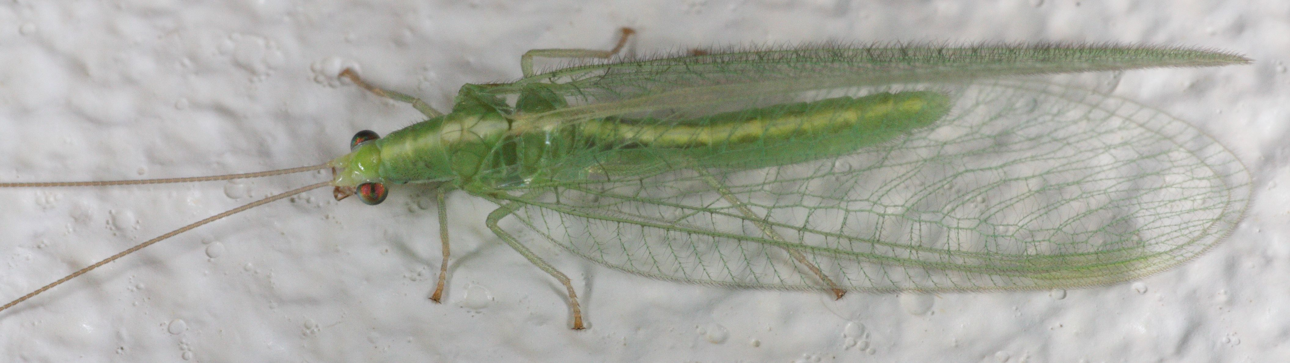 vintergulløye